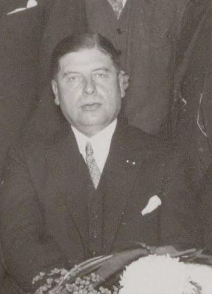 Hendrik Johan Versteeg jr. (1878-1954); Hoofdcommissaris van politie te Amsterdam / Chief Constable of the Amsterdam Police